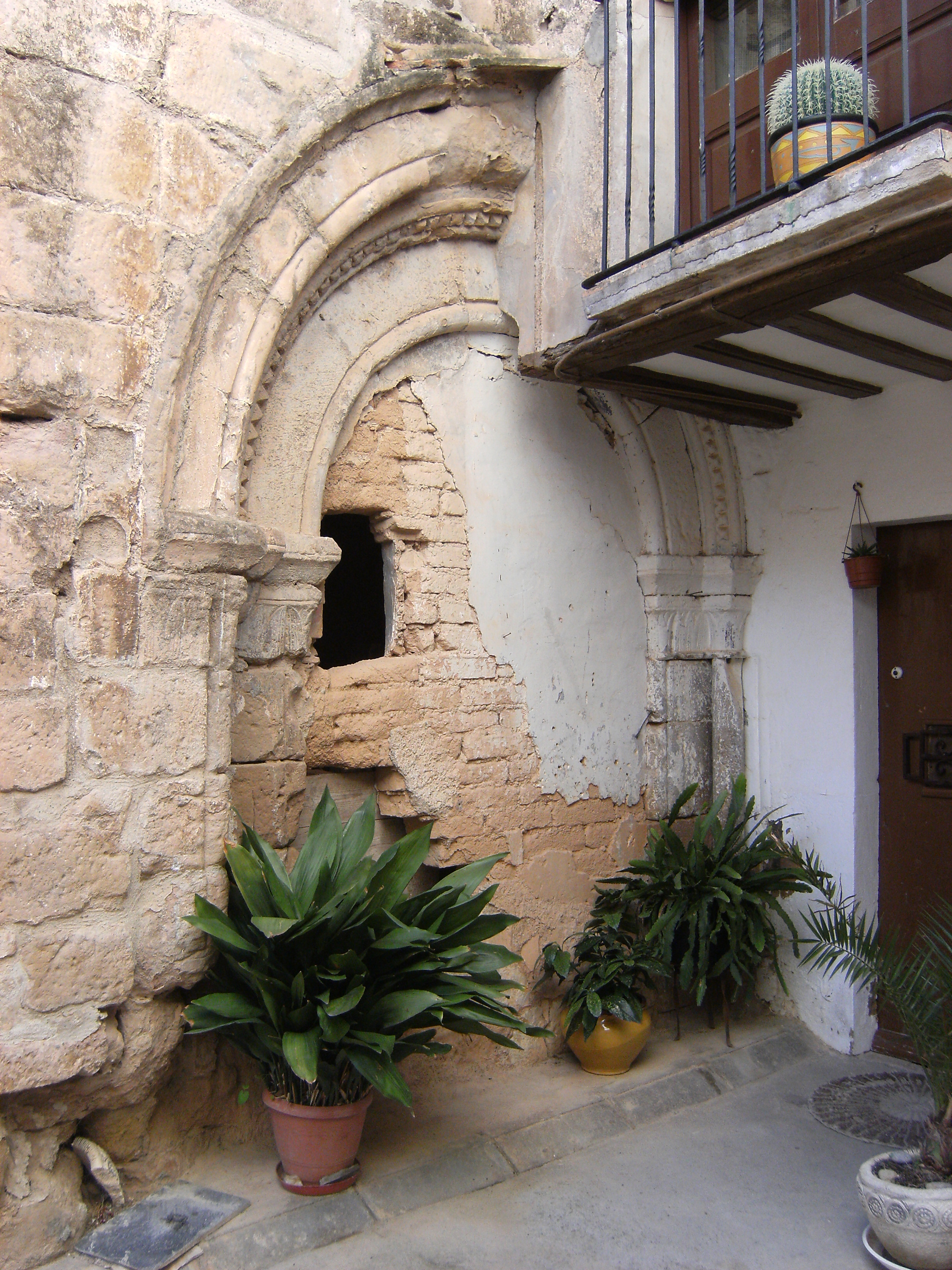 Puerta principal parcialmente tapada y tapiada.